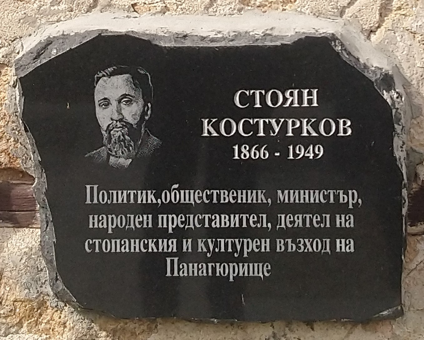 Стоян Костурков (1866 - 1949) - плоча в Исторически музей Панагюрище - Надпис: Политик, общественик, министър, народен представител, деятел на стопанския и културен възход на Панагюрище.